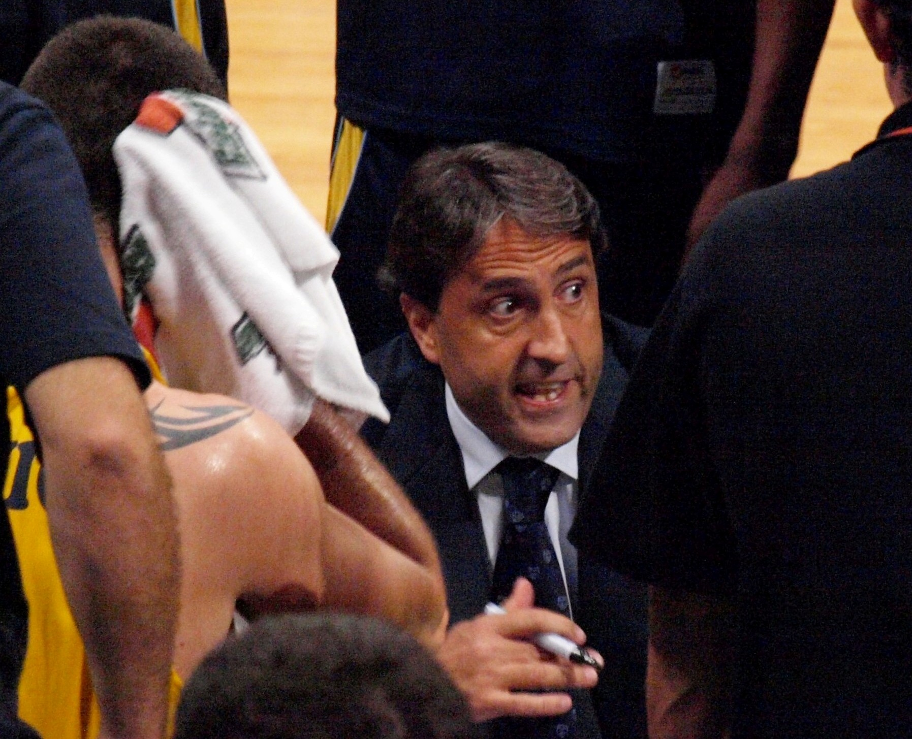 Luis Casimiro, entrenandor del MMT Estudiantes en la temporada 2008/09 dando instrucciones a sus jugadores durante un tiempo muerto del partido que enfrentó a su equipo al DKV Joventut correspondiente a la primera vuelta de la liga ACB 2008/09 en el Olímpico de Badalona.